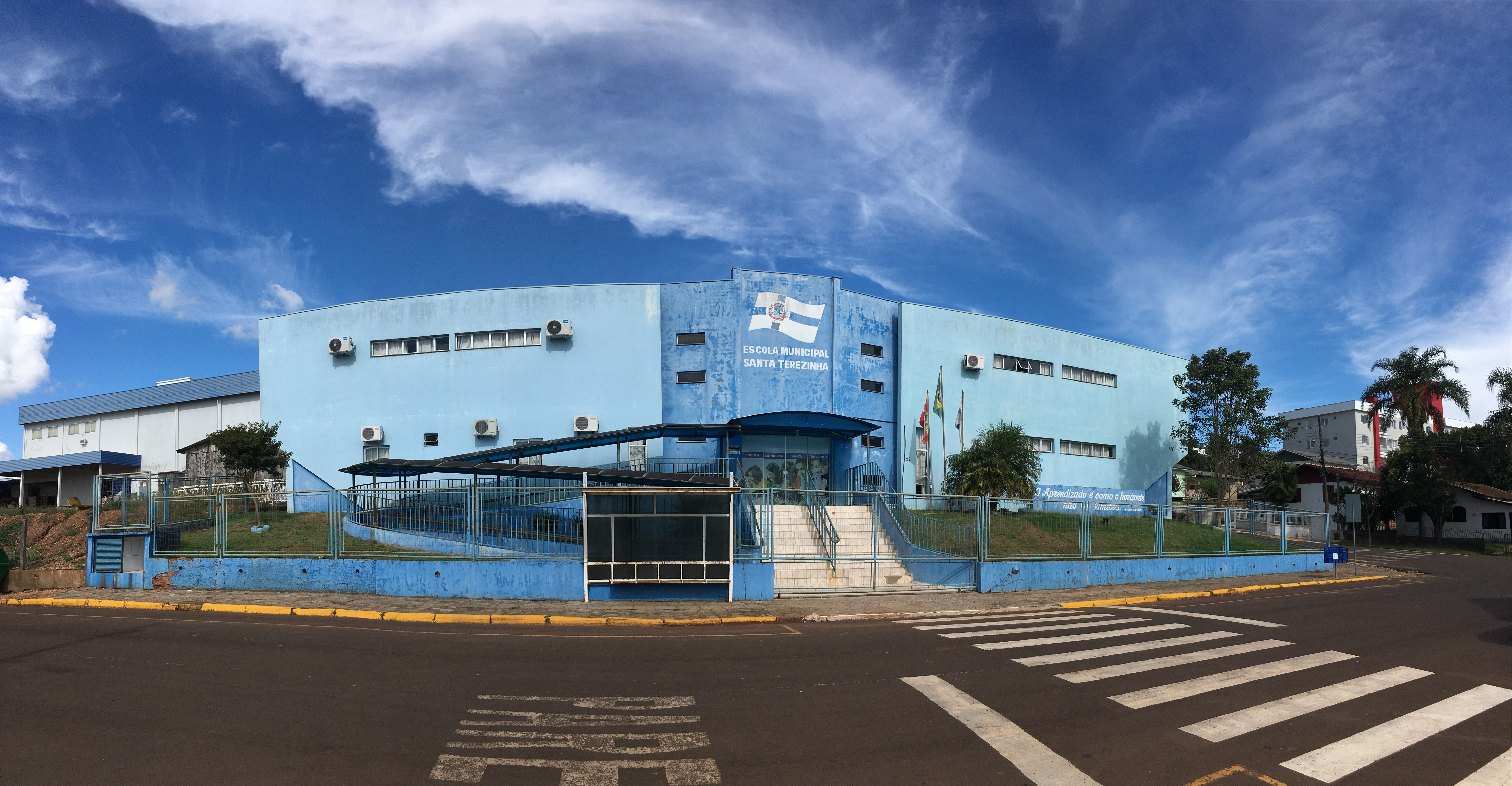 Colegio Santa Terezinha